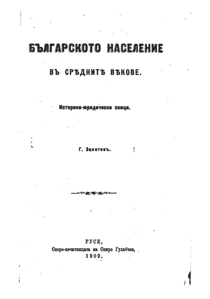 Занетовъ, Гаврилъ (1902) Българското население в срѣднитѣ вѣкове. Историко-юридически скици, Русе: Скоро-печатницата на Спиро Гулабчевъ